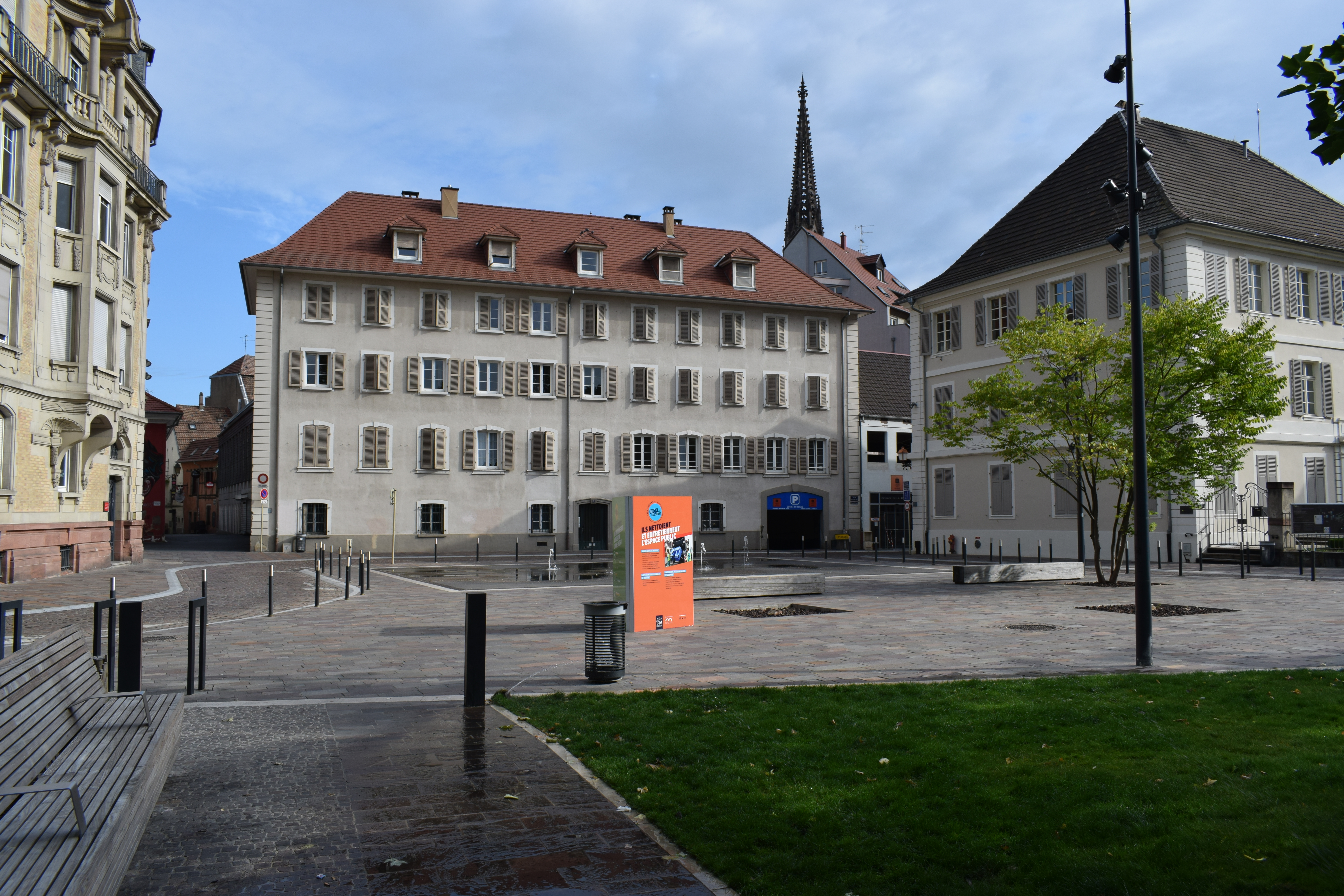 Vue de Mulhouse, dans le département du Haut-Rhin en France.